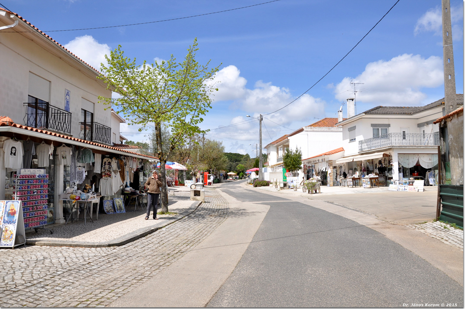 Fatima 0653